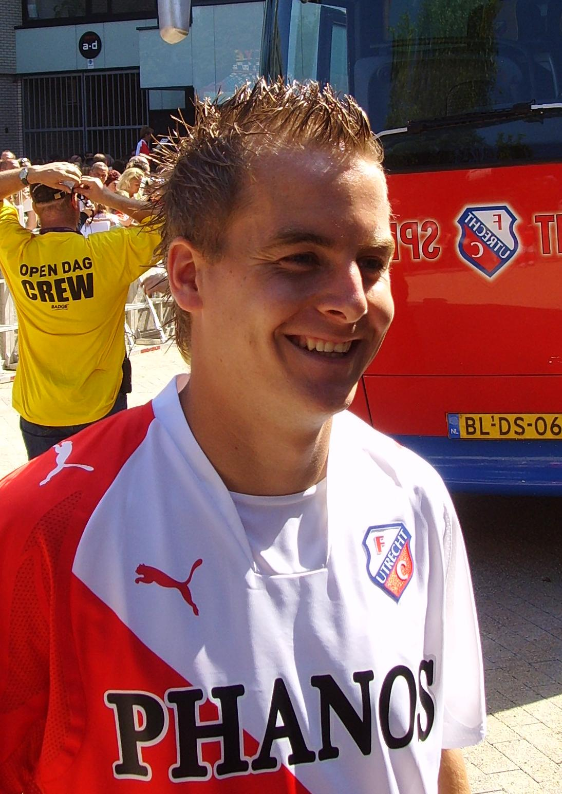 Kees van Buuren, Dutch footballer